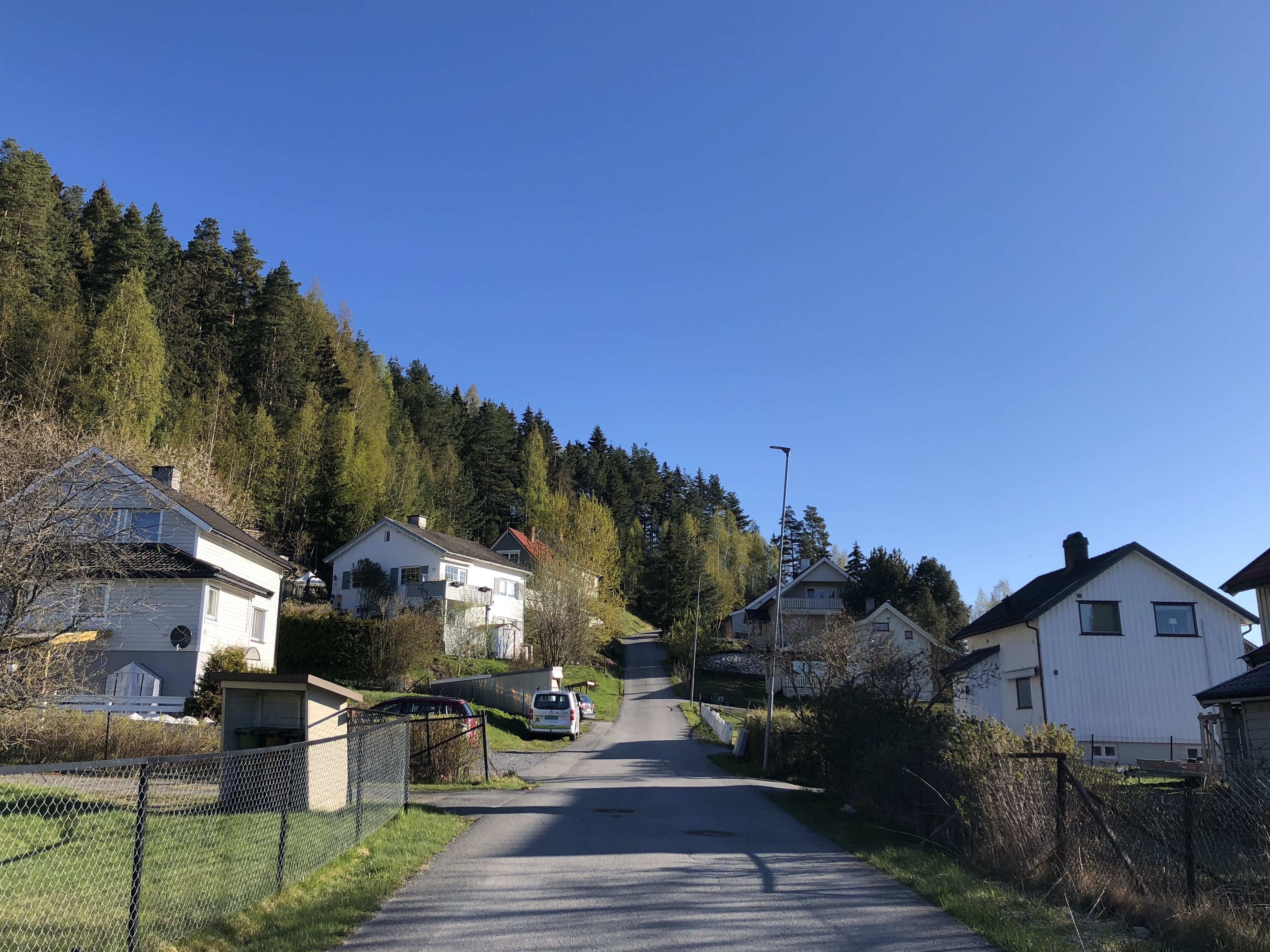 Kringlemoveien, Hønefoss